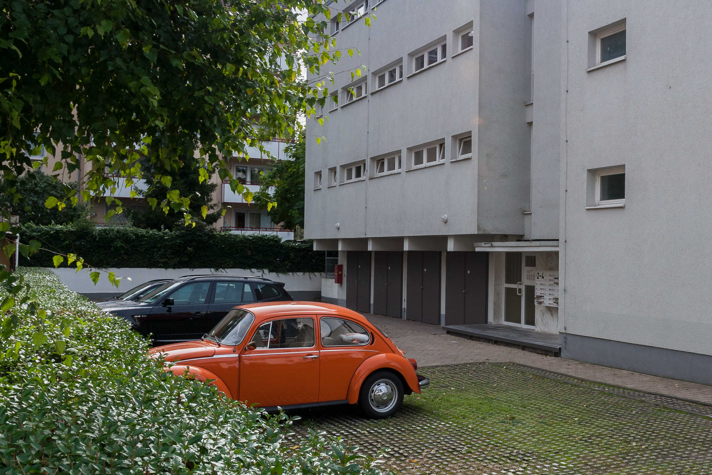 Garageneinfahrt neben dem Apartmenthaus im Hofeckweg 2-4 in Frankfurt-Dornbusch. Am 1. Juni 1972 wurden hier die RAF-Terroristen Andreas Baader, Holger Meins und Jan-Carl Raspe festgenommen.